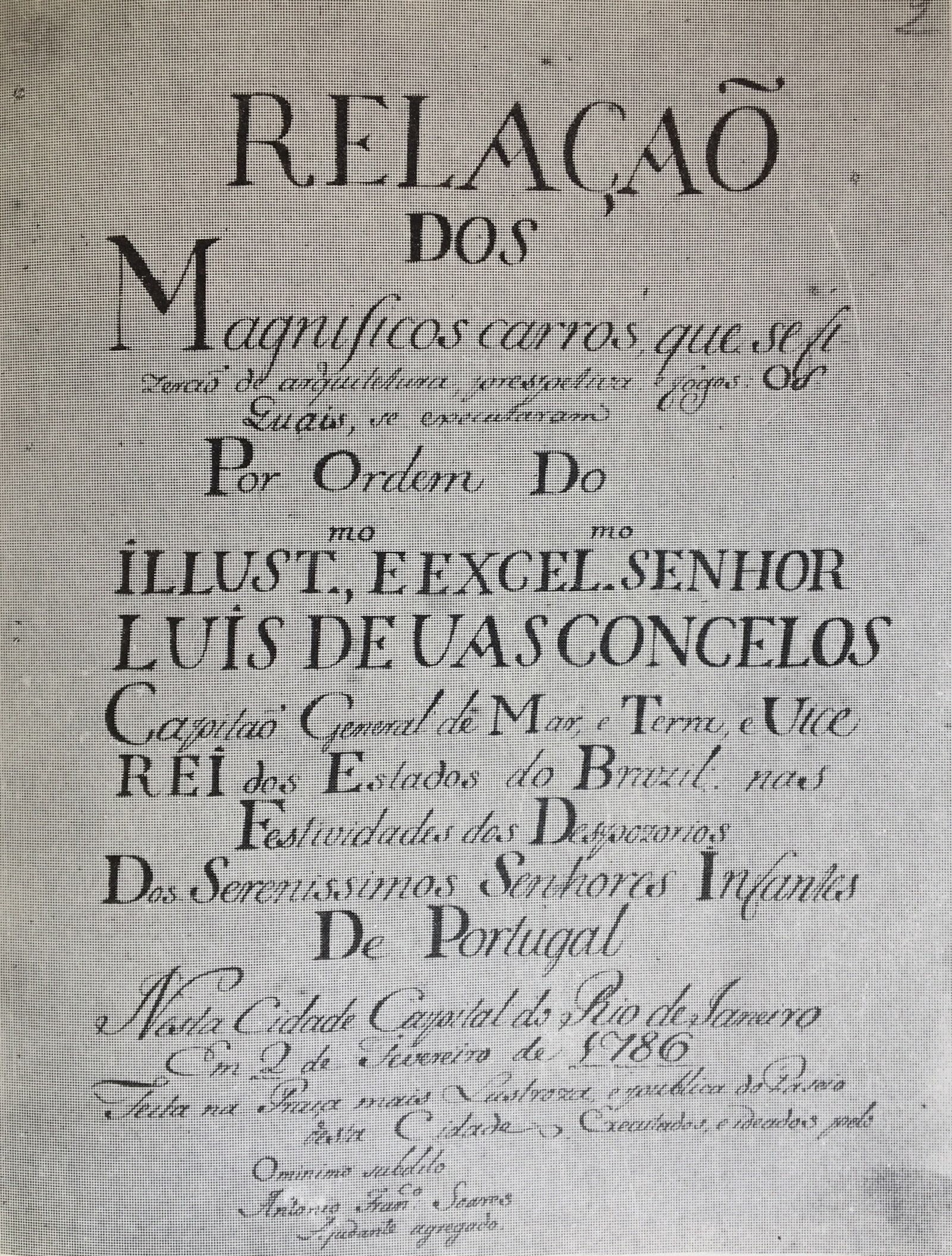 Folha de rosto do manuscrito original "Relação dos Magníficos carros, que se fizerão de arquitetura, perspectiva e fogos. Os quais, se executaram Por Ordem do Illust.mo e Excel.mo Senhor Luis de Vasconcelos, Capitão General de Mar e Terra, e Vice Rei dos Estados do Brazil, nas Festividades dos Despozorios Dos Serenissimos Senhores Infantes de Portugal - Nesta Cidade Capital do Rio de Janeiro. Em 2 de Fevereiro de 1786. Feita na Praça mais Lustroza, e publica do passeio desta cidade. Executados, e ideados, pelo O mínimo subdito Antônio Fran.co Soares Ajudante agregado" de autoria de Antônio Francisco Soares.